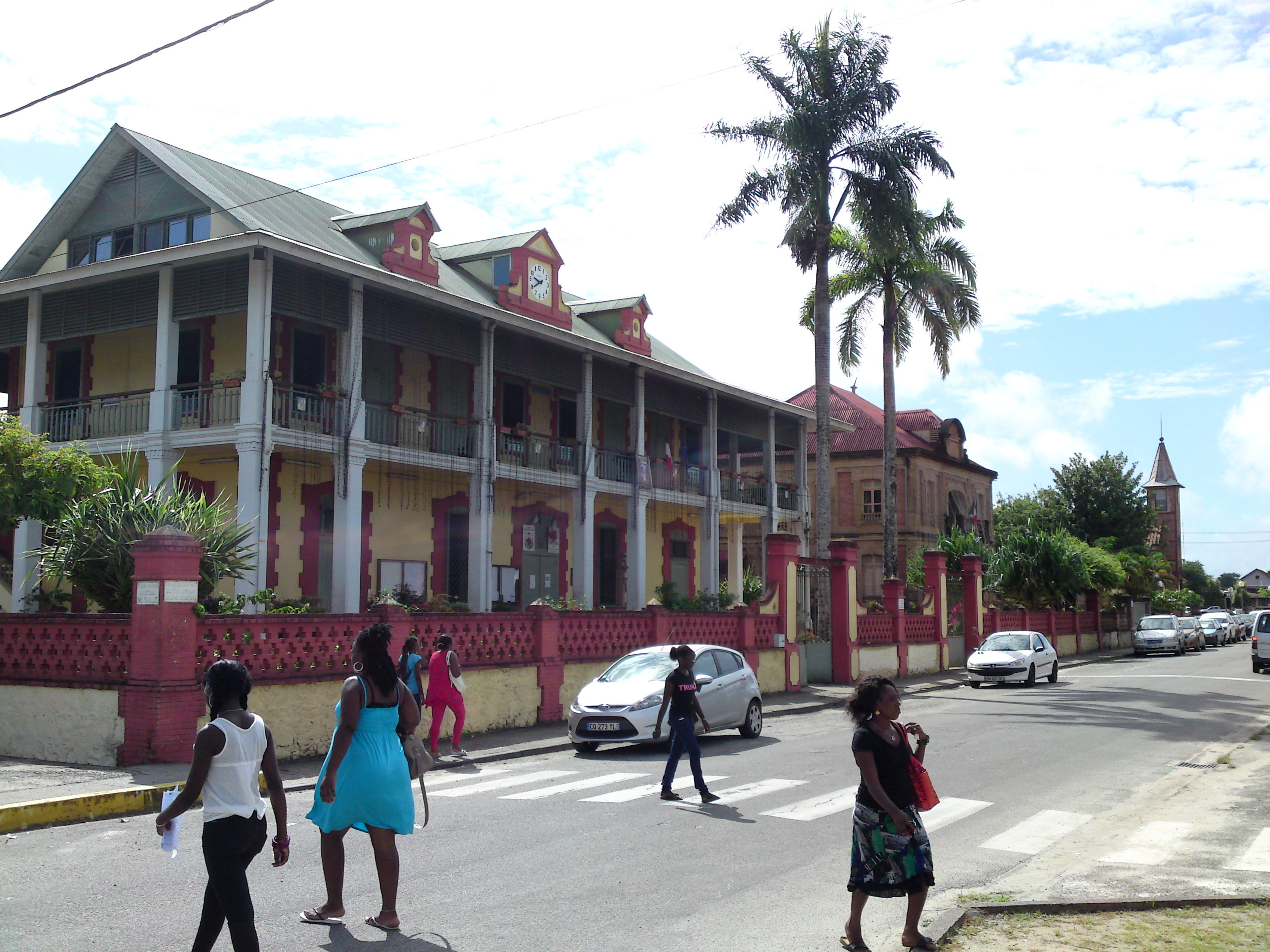 Saint-Laurent-du-Maroni